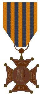 Lombokkruis 1895 Nederland